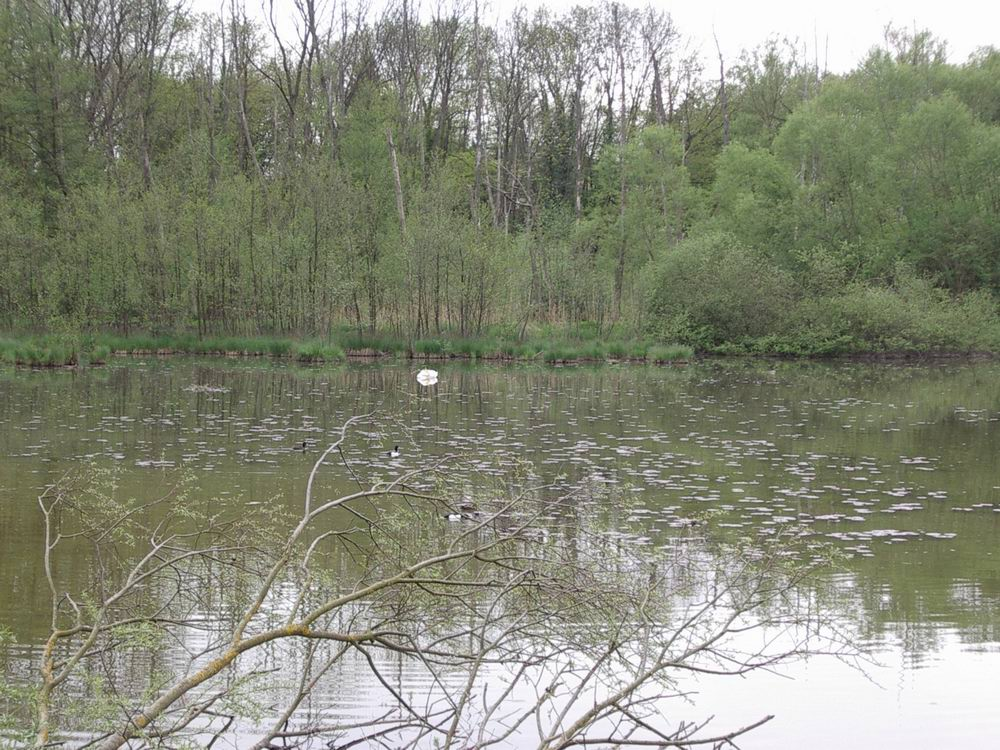 Petite Camargue Alsacienne Photo perso Rémi Stosskopf Date: 01/05/2006